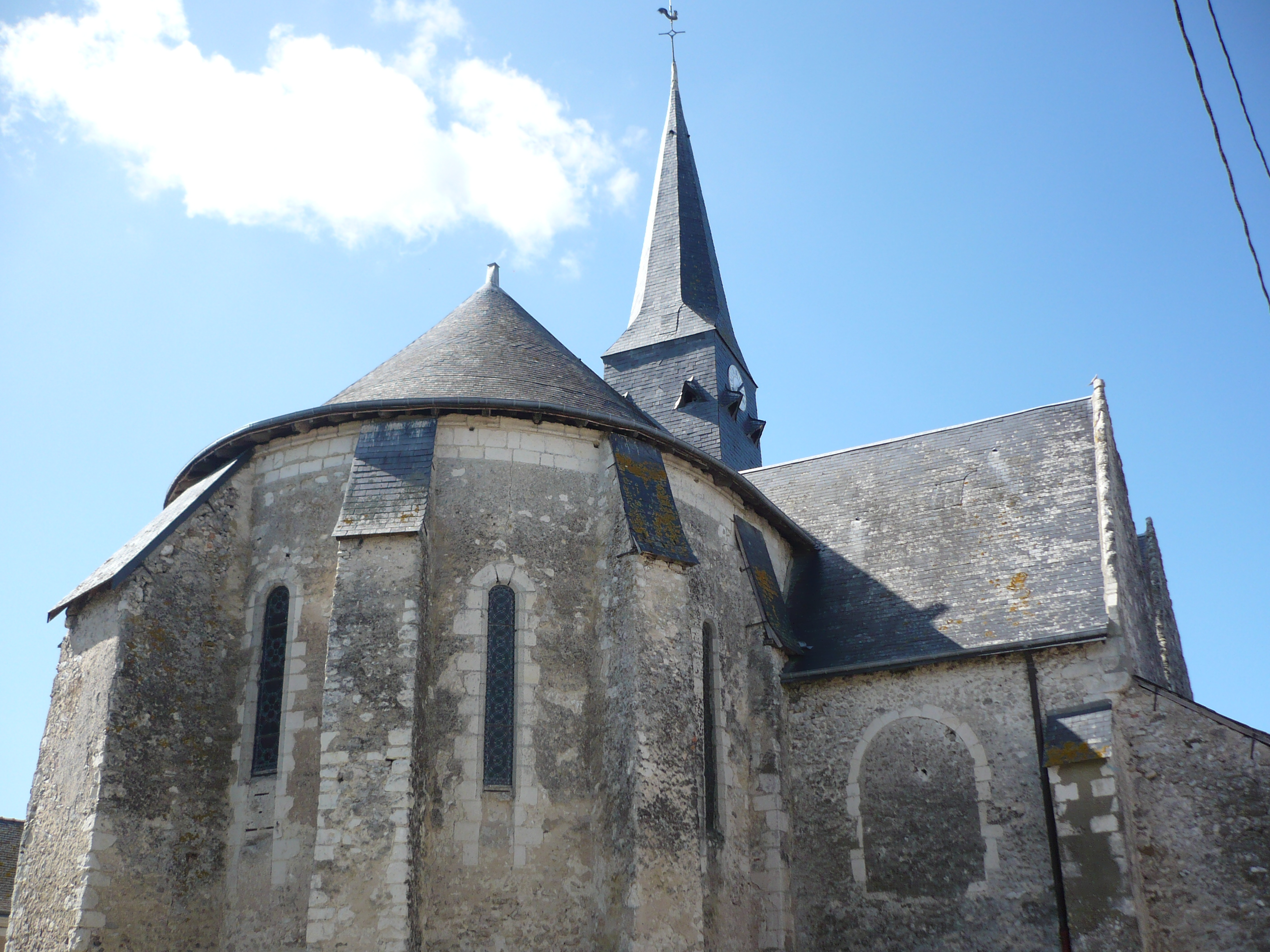 Chigné - Eglise .